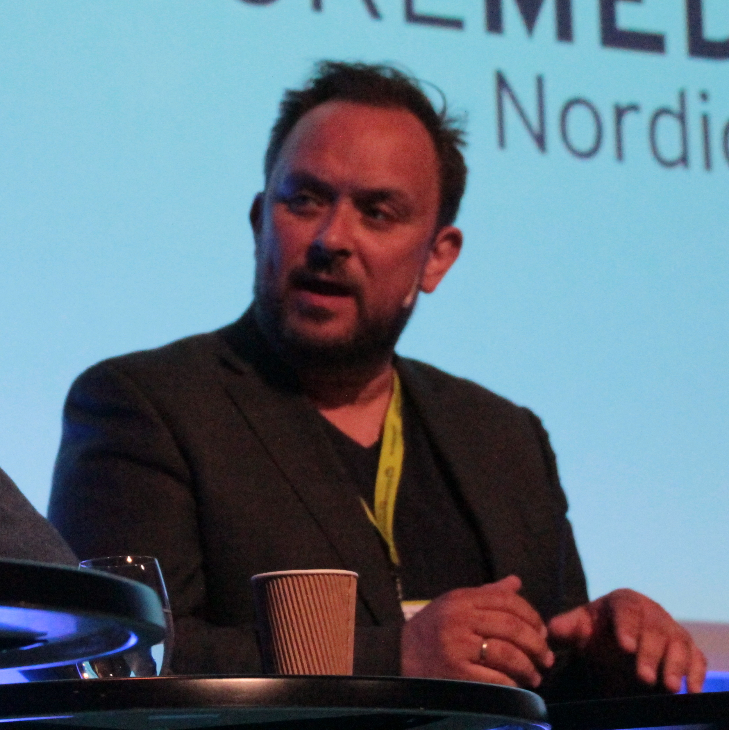 Medvirkende: Skjalg Fjellheim (Politisk redaktør, Nordlys) Irene Halvorsen (Sjefsredaktør, Nationen) Kyrre Nakkim (Samfunnsredaktør, NRK) Hans Petter Sjøli (Debattansvarlig og kommentator, VG) Moderator: Sarah Sørheim, Kulturredaktør Aftenposten